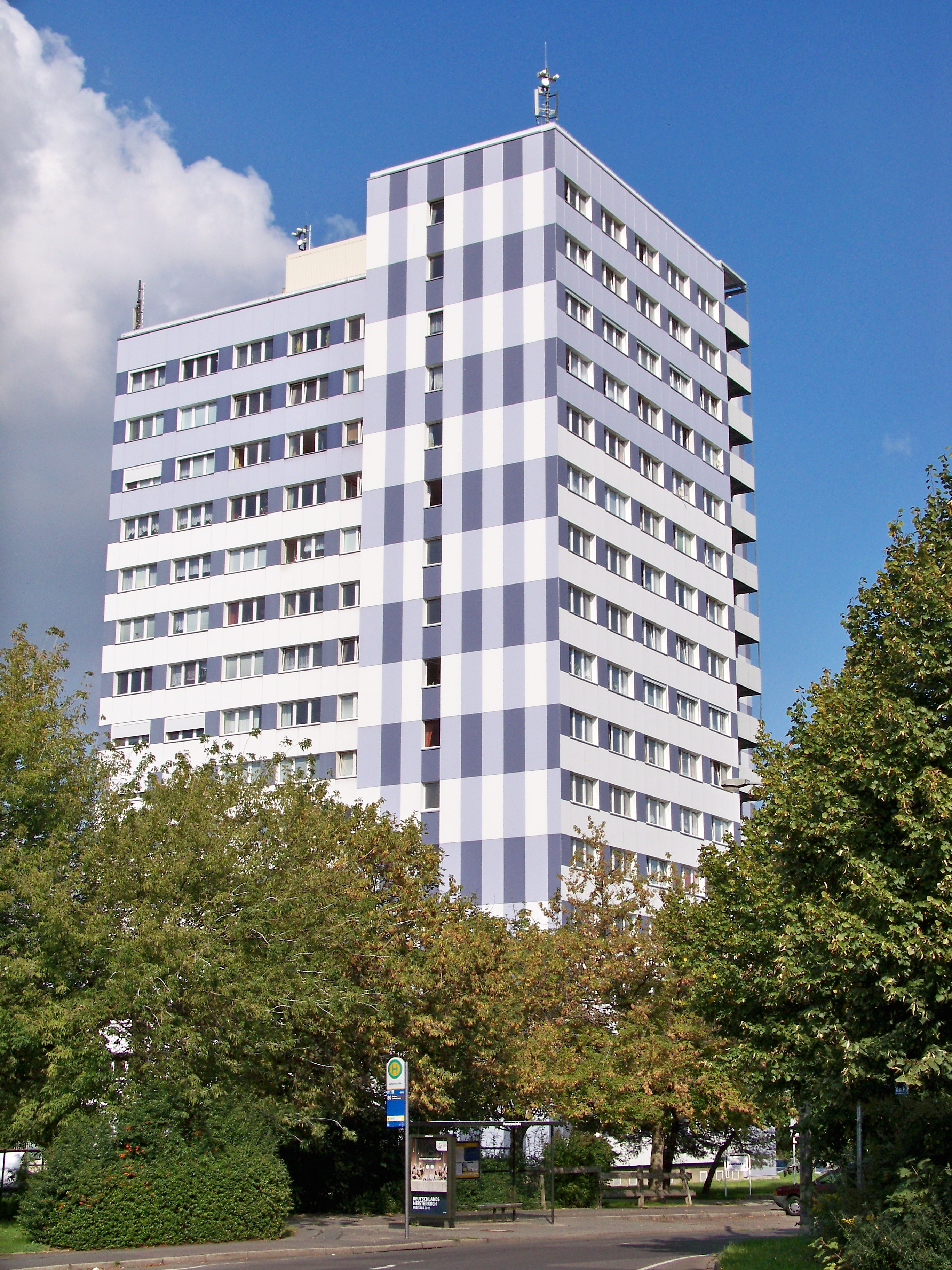 Punkthochhaus (PH) 16 in der Tauchaer Straße in Leipzig–Mockau-Nord